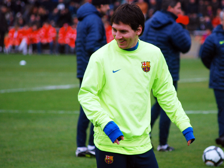 Lionel Messi, en un entrenamiento en el campo del Reus Deportiu, en conmemoración por su centenario.